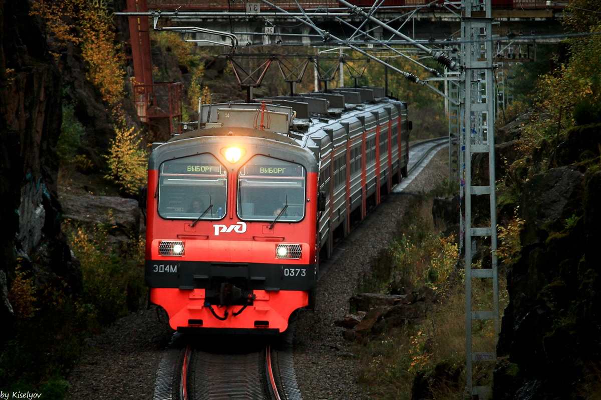 Электропоезд построен в 8-вагонной составности Эксплуатация: с 2011 года в ТЧ-20 ОКТ Санкт-Петербург-Финляндский Особенности: Прислонно-сдвижные двери с выходом на низкие платформы Система кондиционирования и межвагонные переходы аналогичны поездам серии ЭД4МКМ-АЭРО